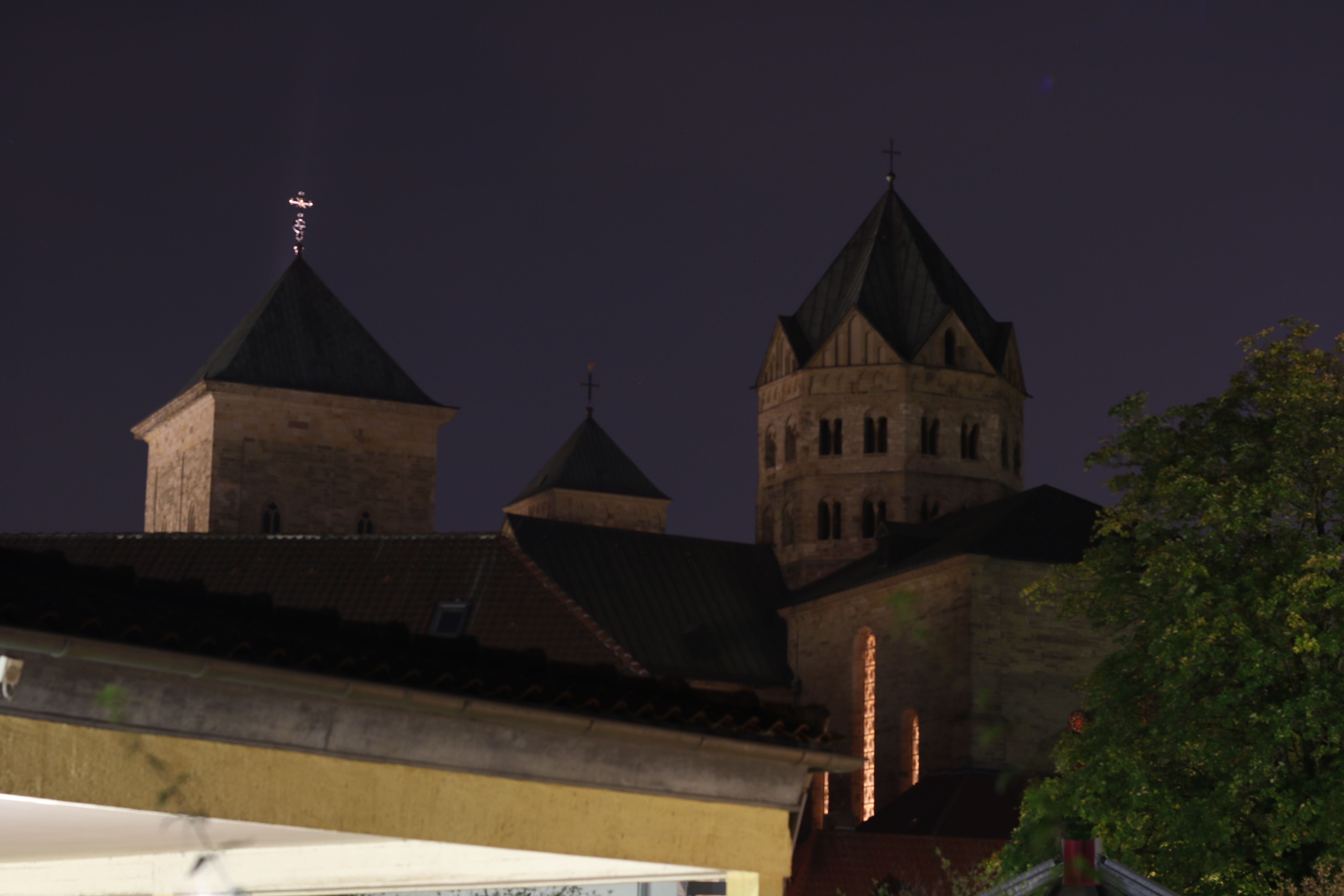 Dom St. Peter Osnabrück bei Nacht